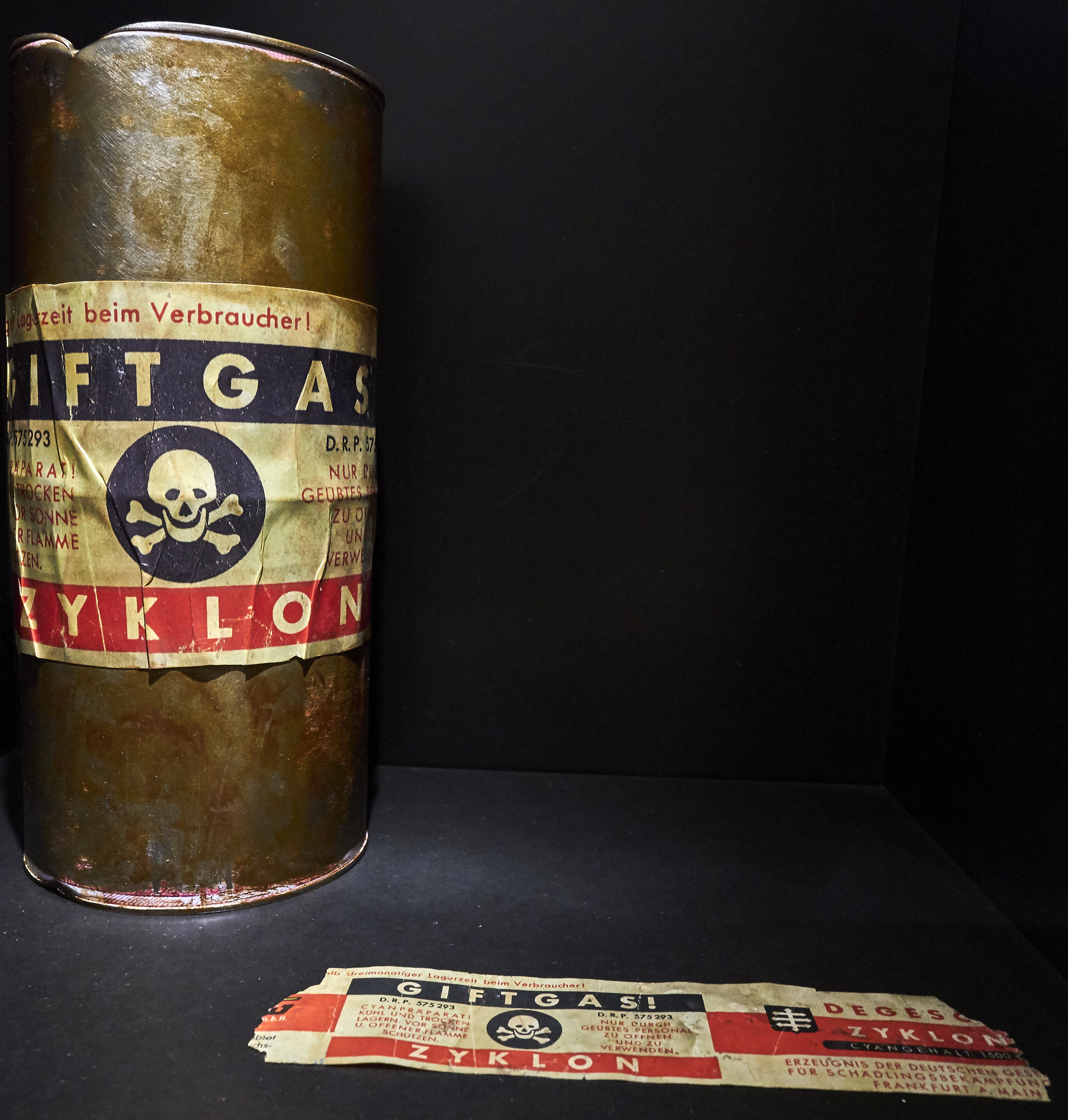 Zyklon gifgas blik - Cyaangehalte 1.500 gram en uitgespreid bliklabel This is a file created at the museum: Kazerne Dossin Memorial in Mechelen